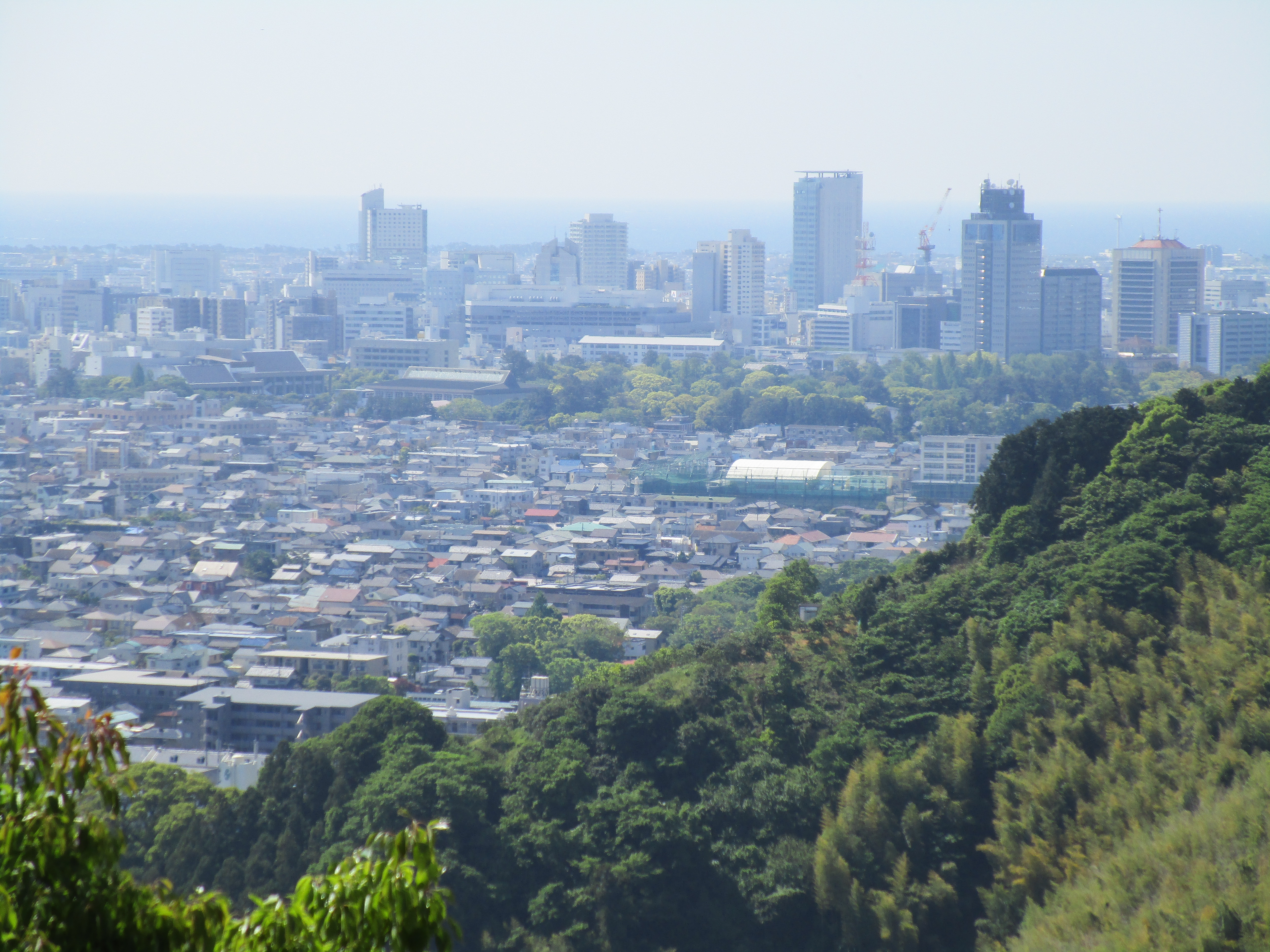 賎機山ハイキング